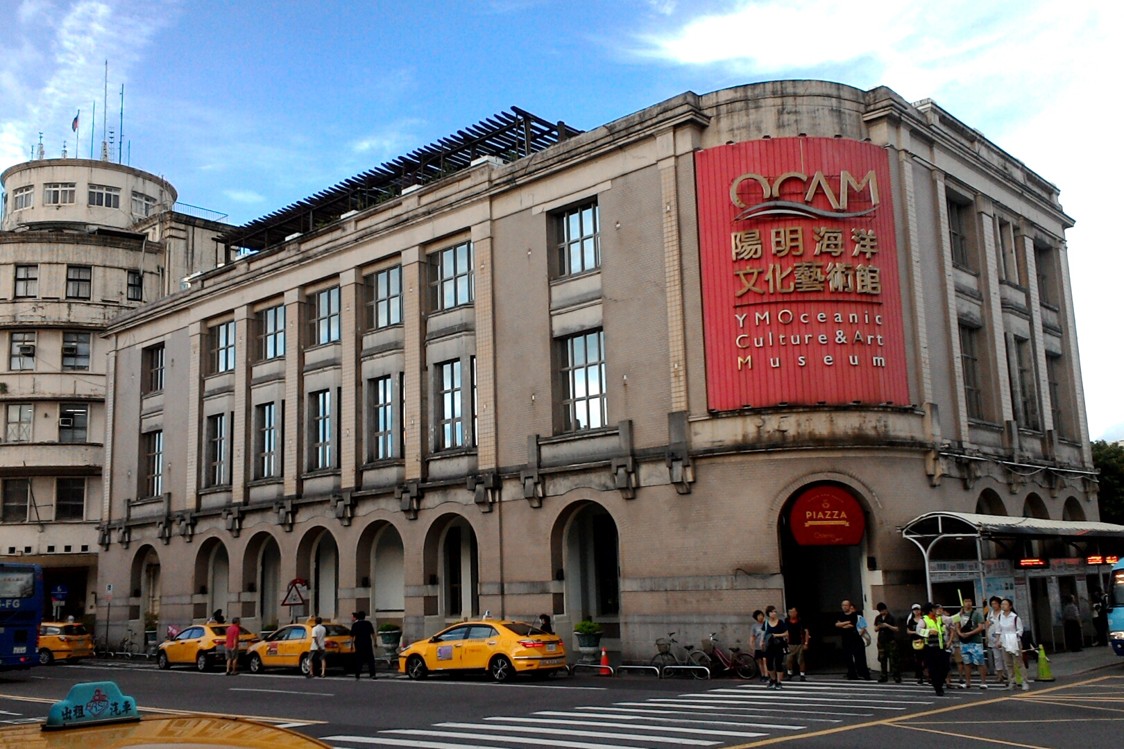 陽明海洋文化藝術館,台灣省基隆市仁愛區文昌里